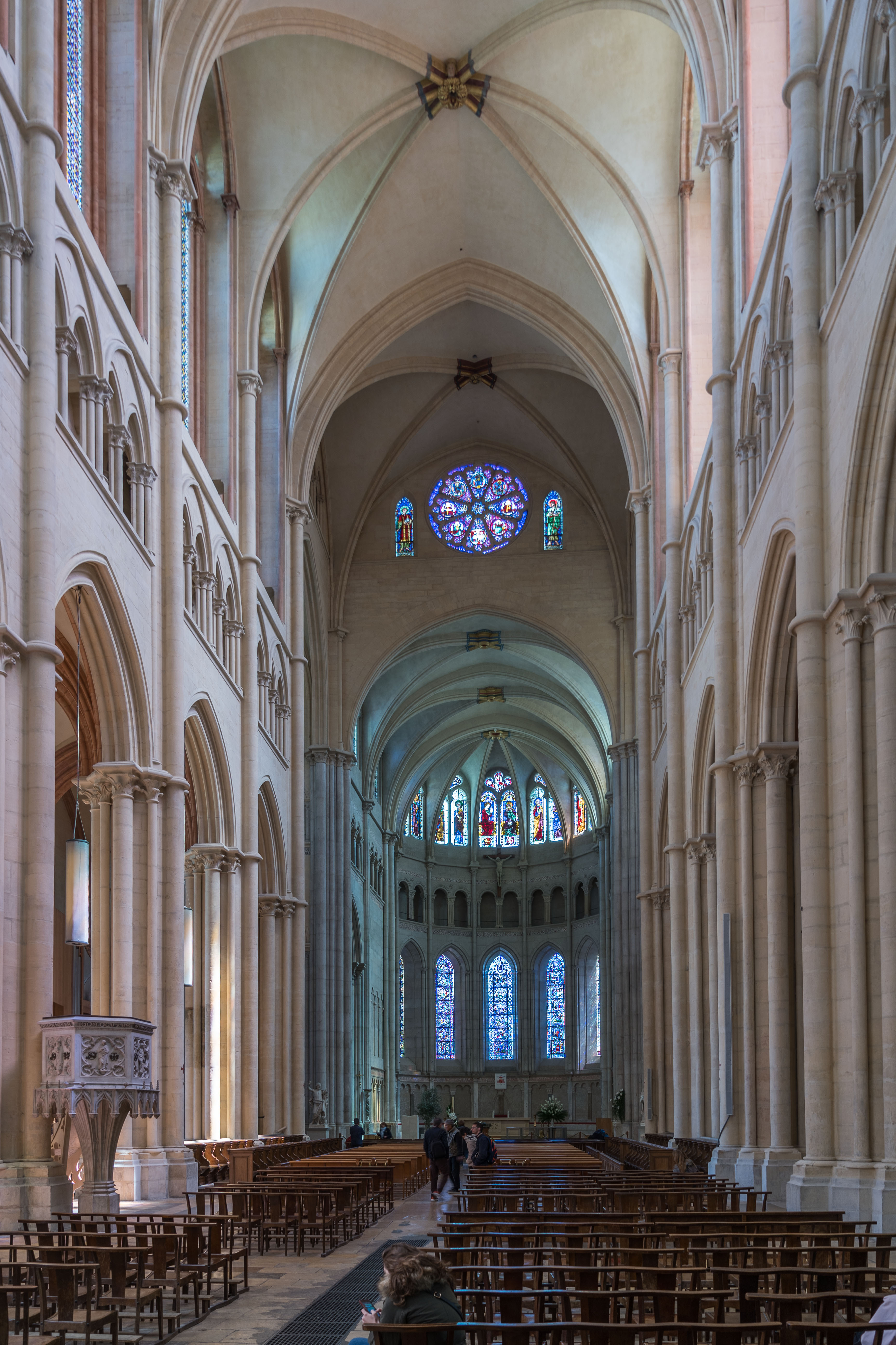 Lyon - Cathédrale Saint-Jean - Nef